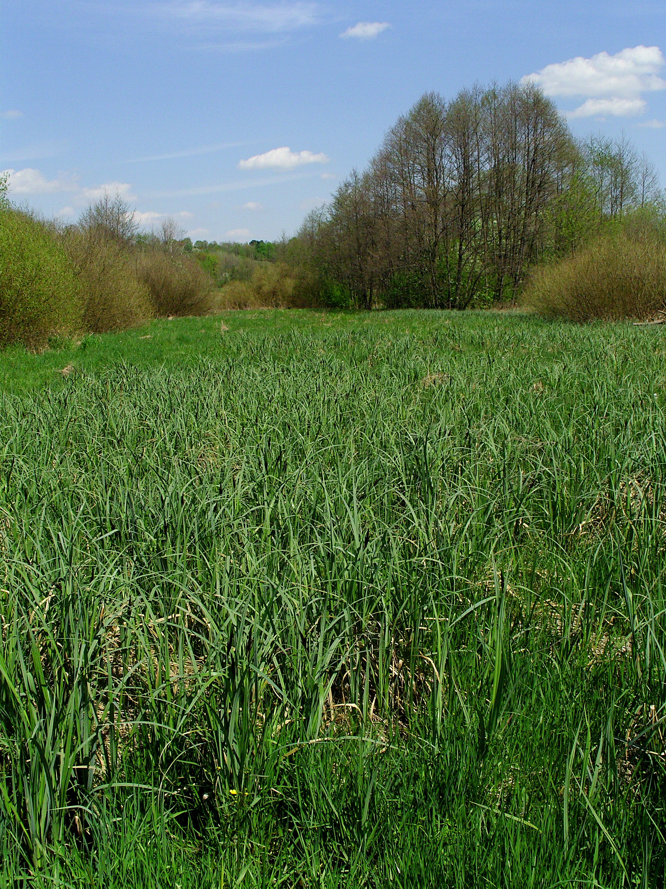 Łąki nad Młynówką w Bączalu Dolnym (Pogórze Ciężkowickie)